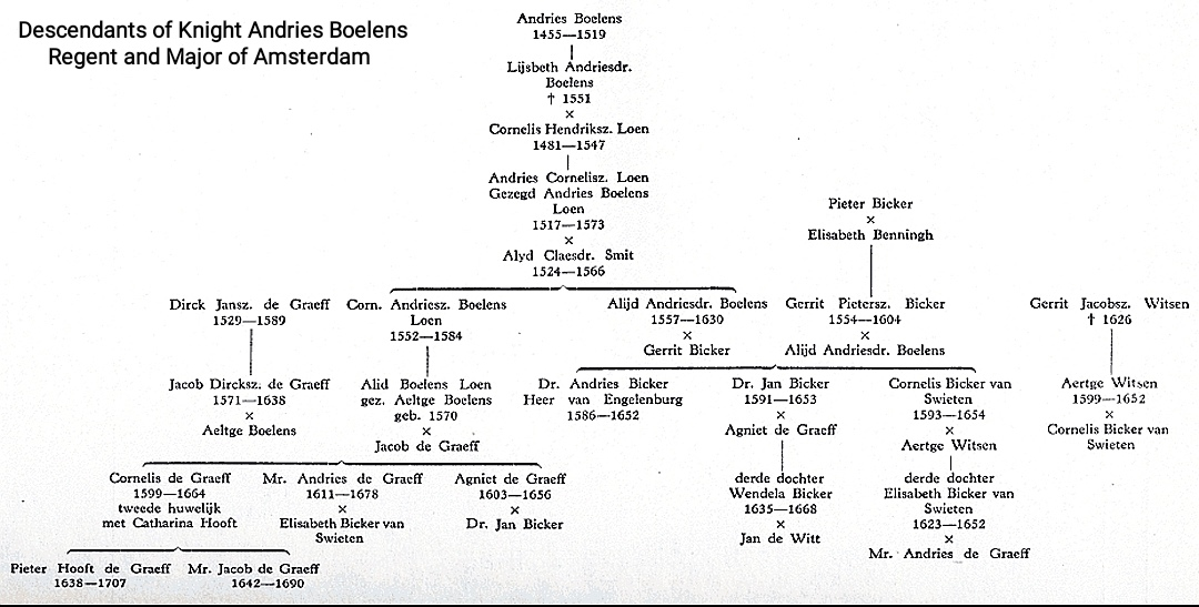 Descendants of Knight Andries Boelens, Regent and Major of Amsterdam (1455-1519). Family Boelens, Boelens Loen, De Graeff, Bicker, Johan de Witt...